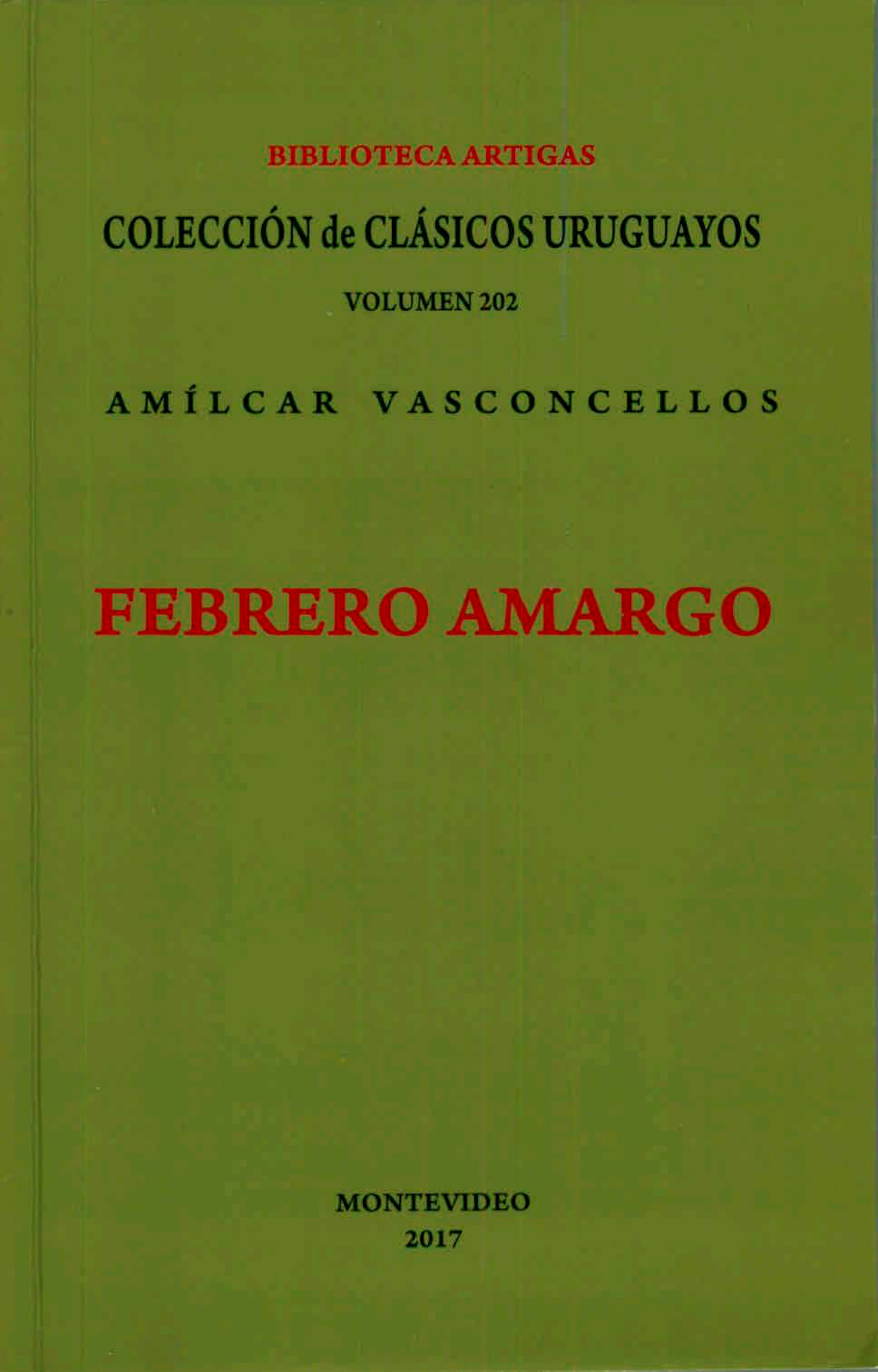 Portada del libro Febrero amargo, de Amílcar Vasconcellos. Edición de la Colección de Clásicos Uruguayos (2017).